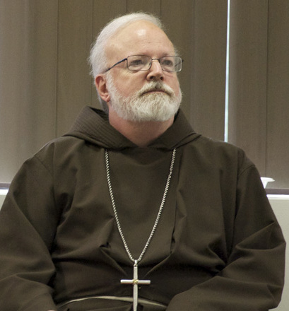 Cardinal Seán Patrick O'Malley at CNMC Afternoon